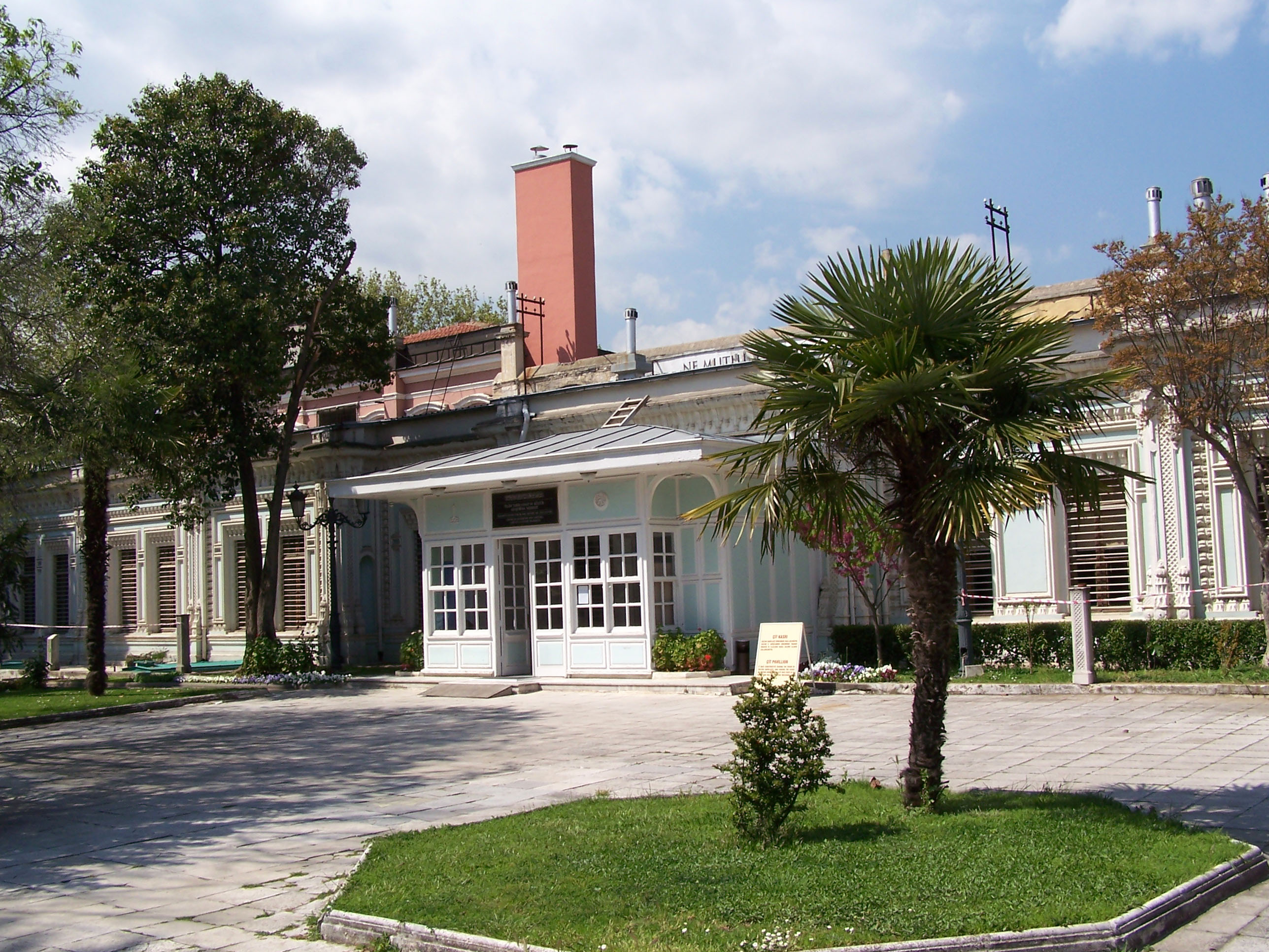 Çit Kasrı (Çit Pavillion), Yıldız Sarayı in Beşiktaş, İstanbul, Turkey